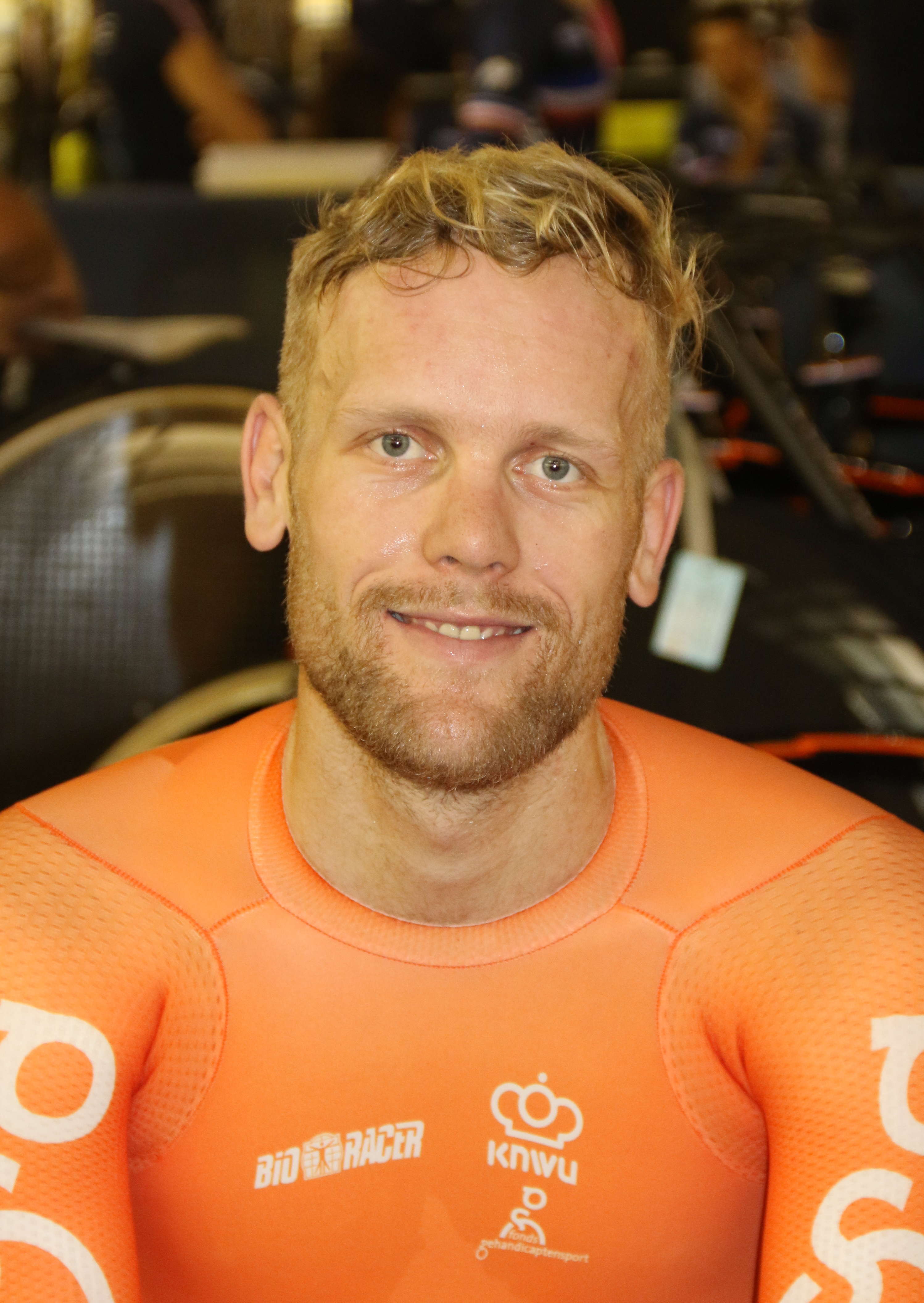 Roy Eefting, neiderländischer Radsportler